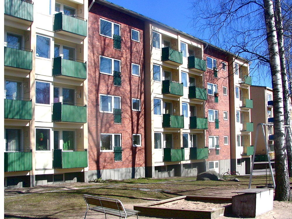 Punahilkantie 12.at Roihuvuori in Helsinki. Architecht Hilding Ekelund.